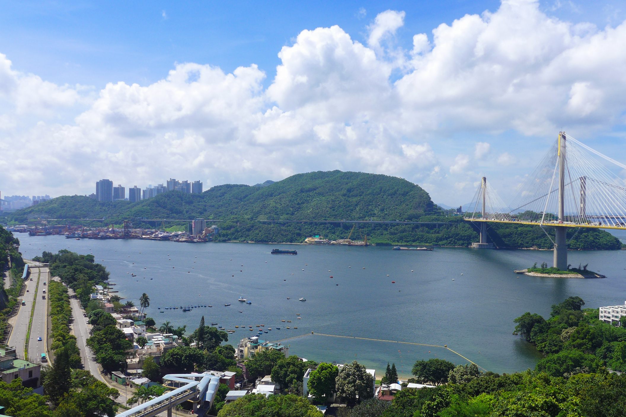 Tam Kon Shan